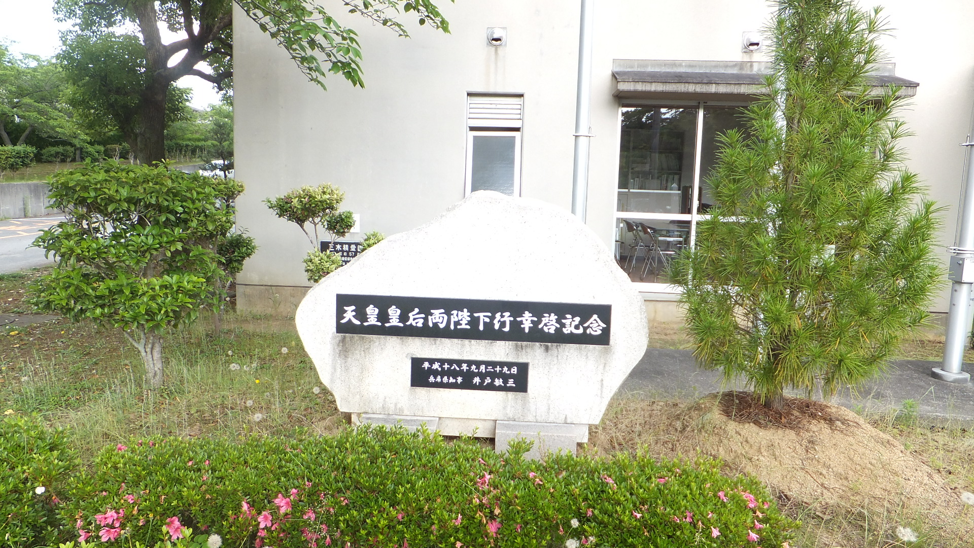 三木精愛園 天王来迎記念脾